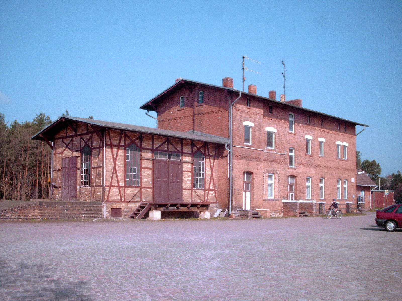 Bahnhof Walddrehna, Ansicht vom Bahnhofsvorplatz